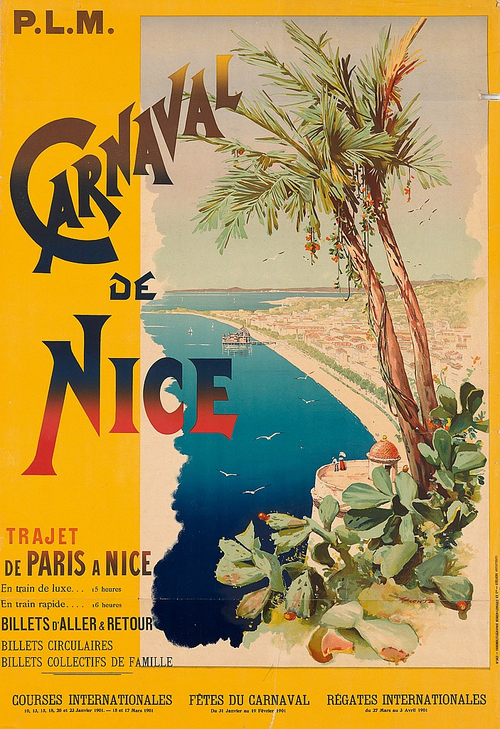 Affiche officielle du carnaval de Nice - 1898 "PLM - Carnaval de Nice 1898" Illustrée par Édouard John Menta (1858 - 1914) Chromolithographie Berger - Levrault et Cie, Nancy, France